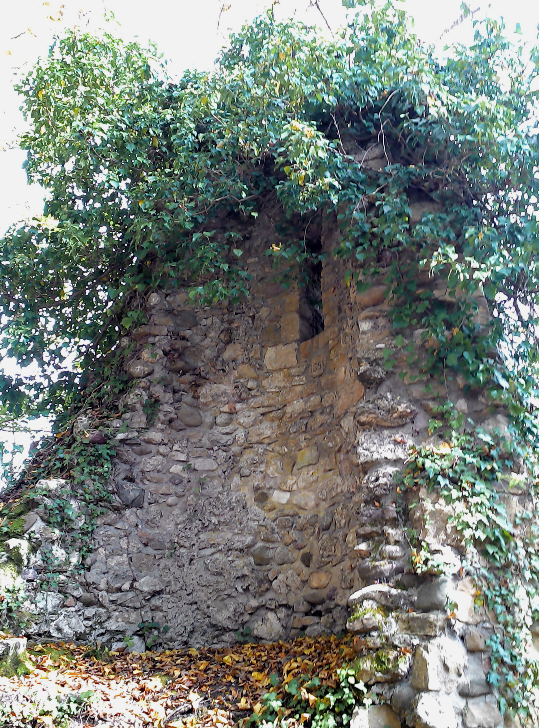 Burgruine Weisswasserstelz (Nordostturm) bei Hohentengen am Hochrhein, Landkreis Waldshut, Badeb-Württemberg.